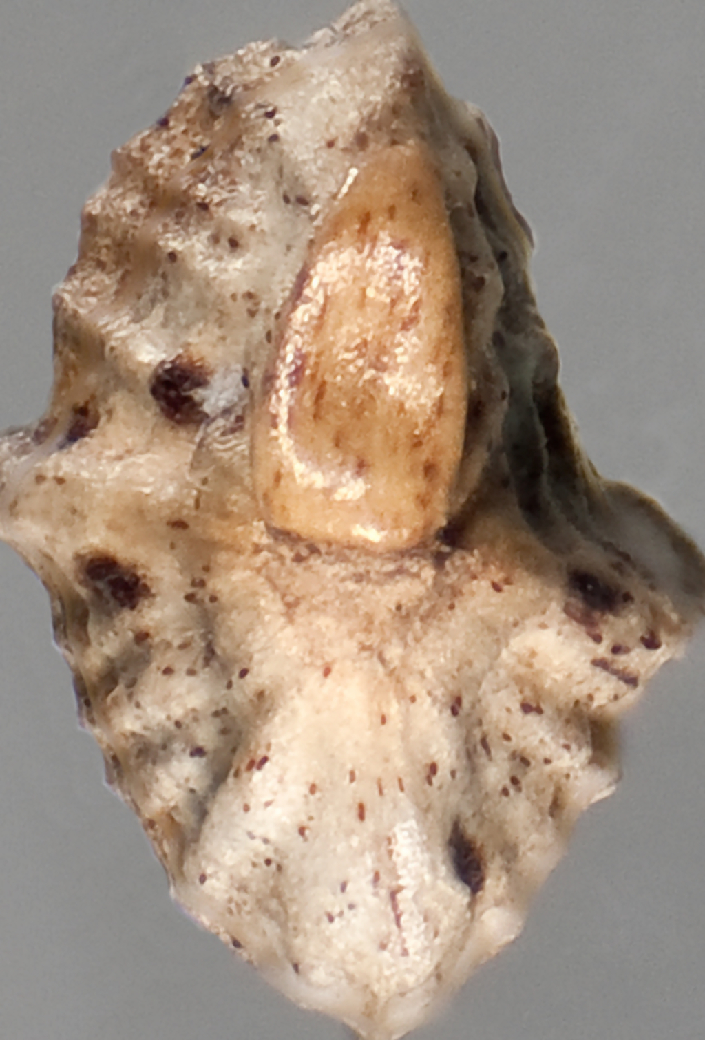 Onopordum illyricum - (Cardo borriquero, toba) - Cipsela suelta: vista basal con eleosoma.